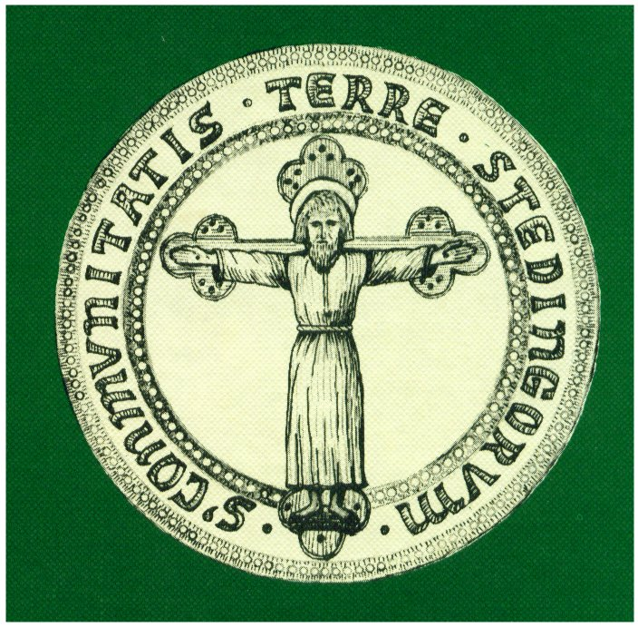 Stedinger Segel, tekent na Afdrück ut dat 16. Johrhunnert